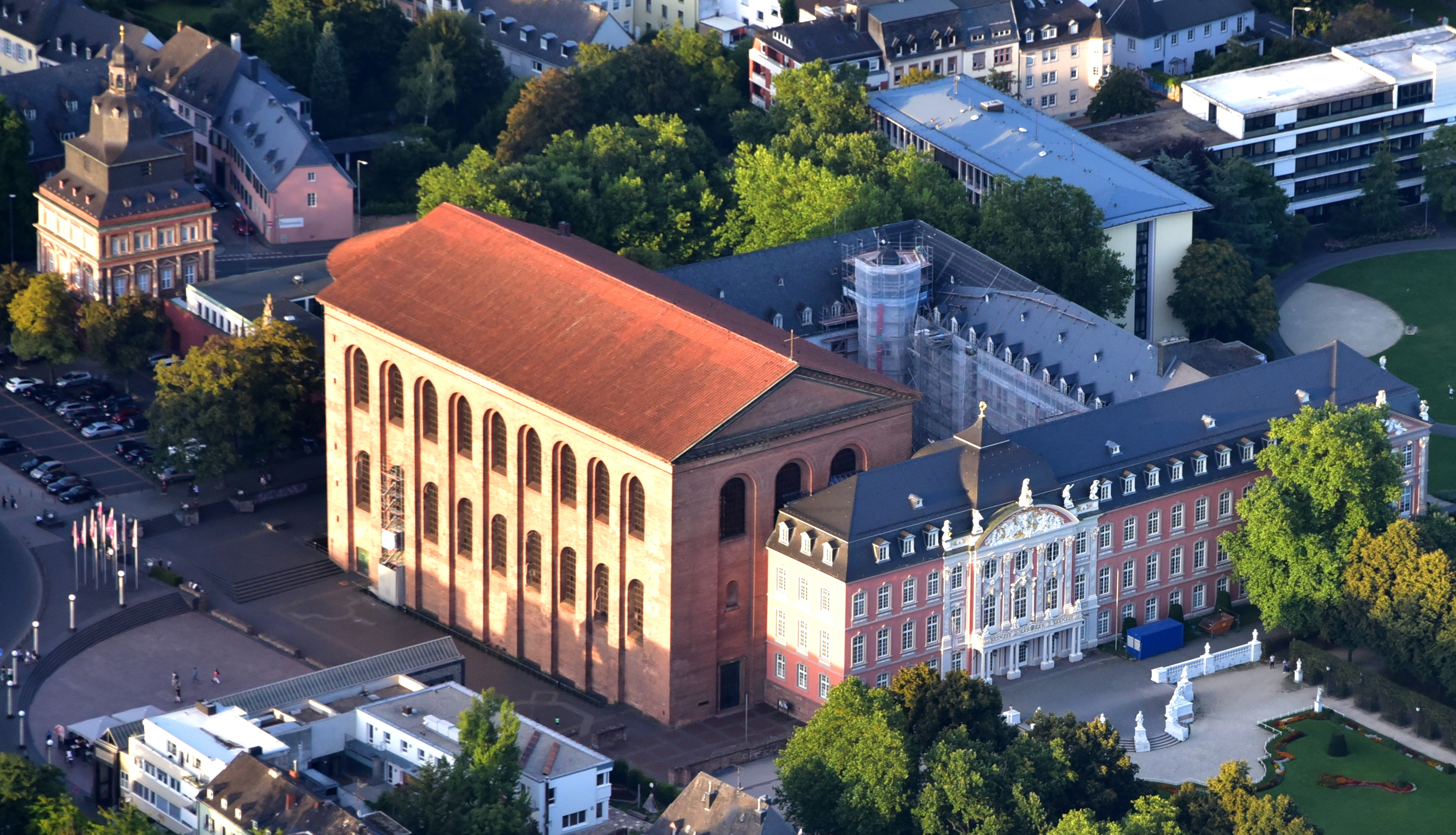 Trier, Konstantin-Basilika, Kurfürstliches Palais, Luftaufnahme (2016)